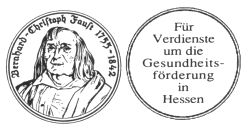 Amtliche Darstellung der Bernhard-Christoph-Faust-Medaille